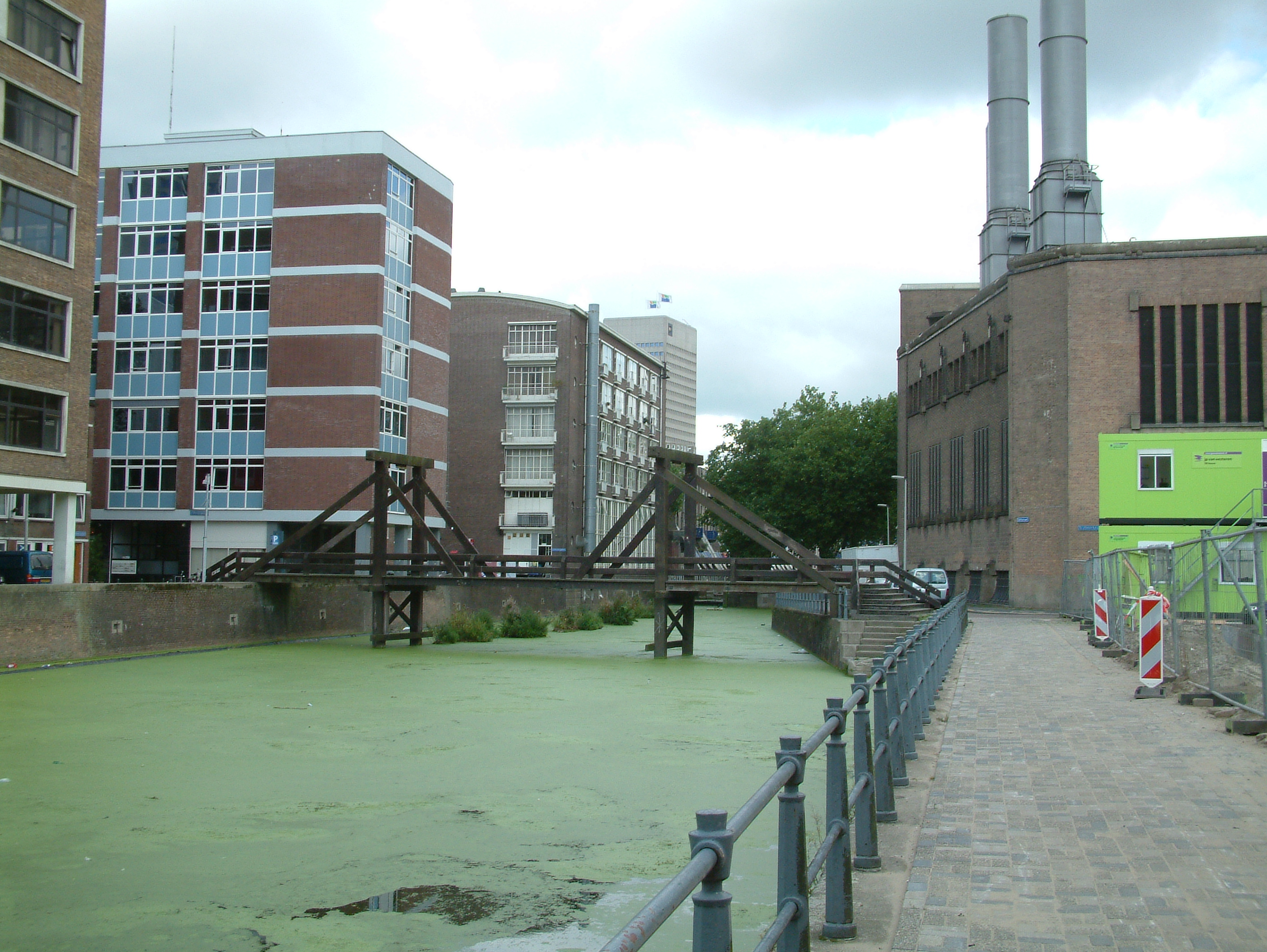 Bruggen over de Rotte, De Krattenbrug, zuidkant